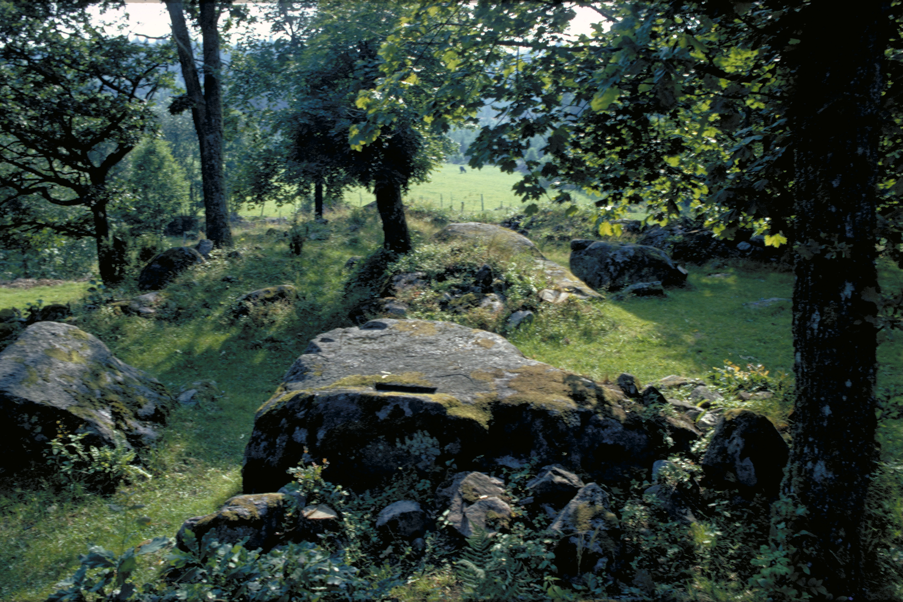 Offerlunden. Bilden troligen från omkring 1970. Motiv: Halahult i Blekinge Kategori: Plats med tradition, Runristning/runsten Offerlunden. Bilden troligen från omkring 1970. Halahult i Blekinge.